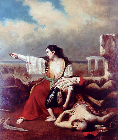 E. de Lansac. Scène de l' Exodos. (1828) Musée municipal de Missolonghi.